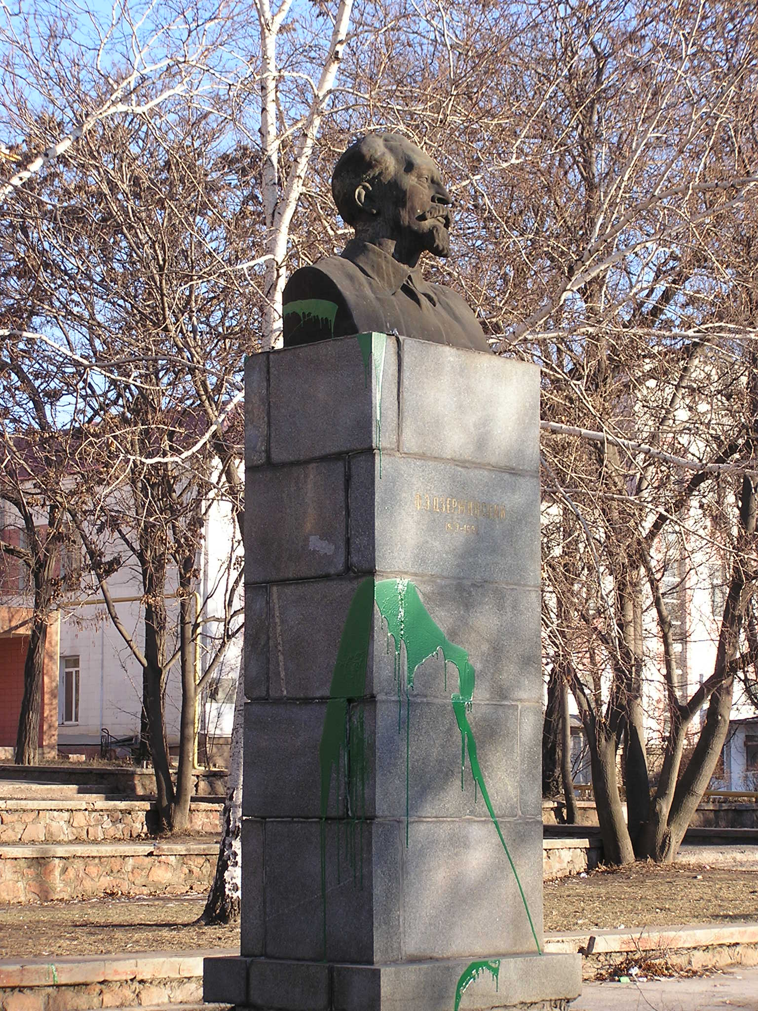 Памятник Дзержинскому в Донецке, облитый краской в конце декабря 2007 года